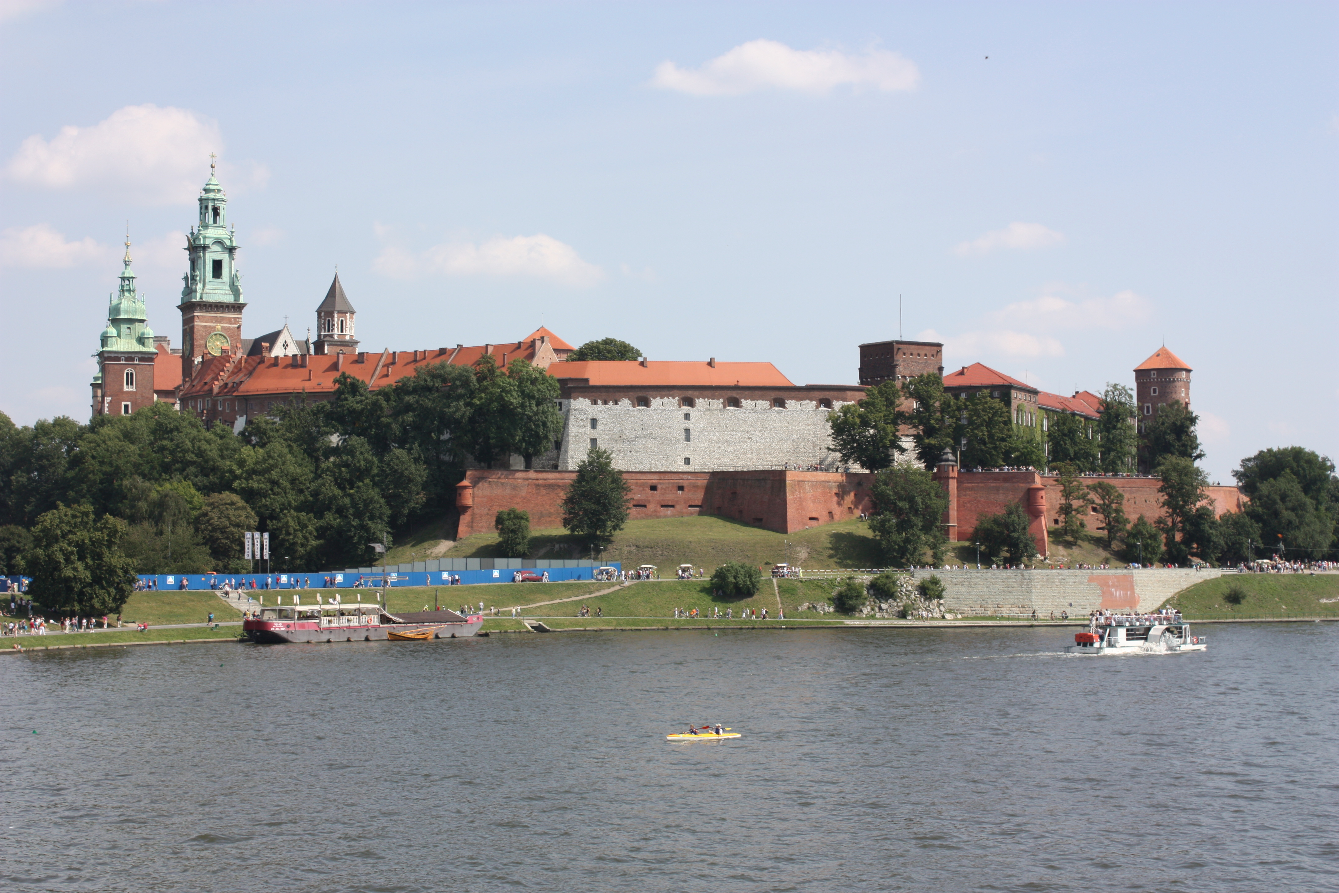 Krakow, Wawel Castle